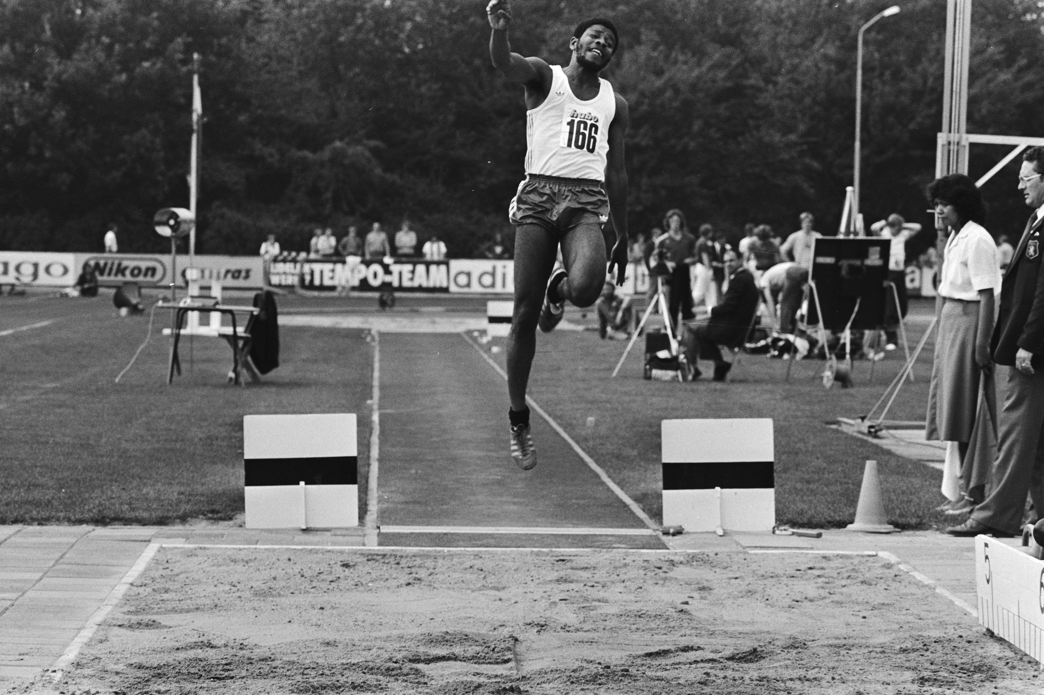 Collectie / Archief : Fotocollectie Anefo Reportage / Serie : Nederlandse kampioenschappen atletiek, Sittard Beschrijving : Roy Sedoc in aktie bij verspringen Datum : 9 augustus 1980 Locatie : Limburg, Sittard Trefwoorden : atletiek, kampioenschappen, sport Persoonsnaam : Sedoc, Roy Fotograaf : Antonisse, Marcel / Anefo Auteursrechthebbende : Nationaal Archief Materiaalsoort : Negatief (zwart/wit) Nummer archiefinventaris : bekijk toegang 2.24.01.05 Bestanddeelnummer : 930-9540